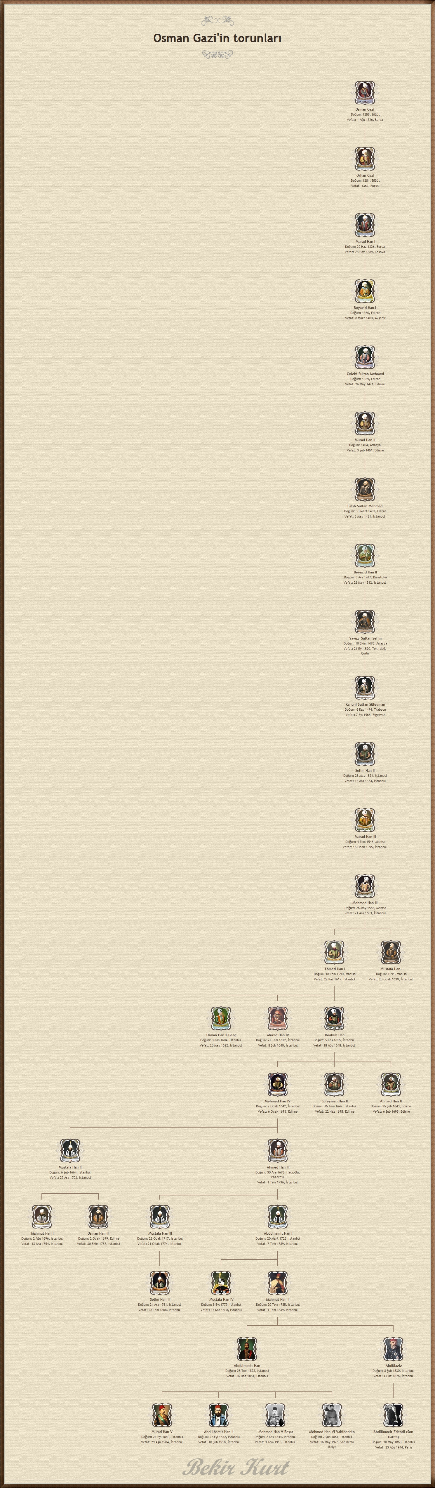 Osmanlı Hanedan Soyunun Seceresi.